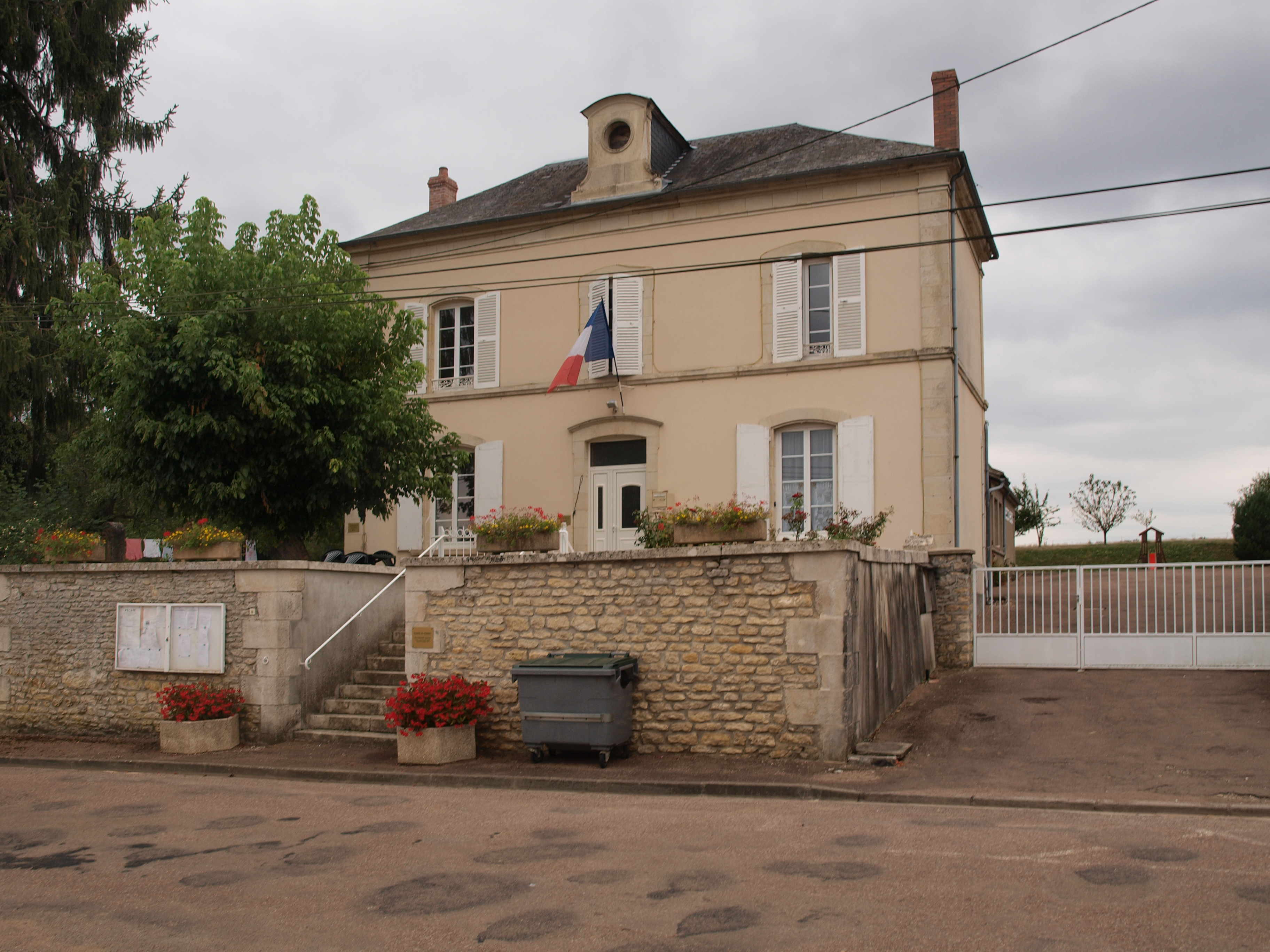 Perroy (Nièvre, France) ; la mairie.